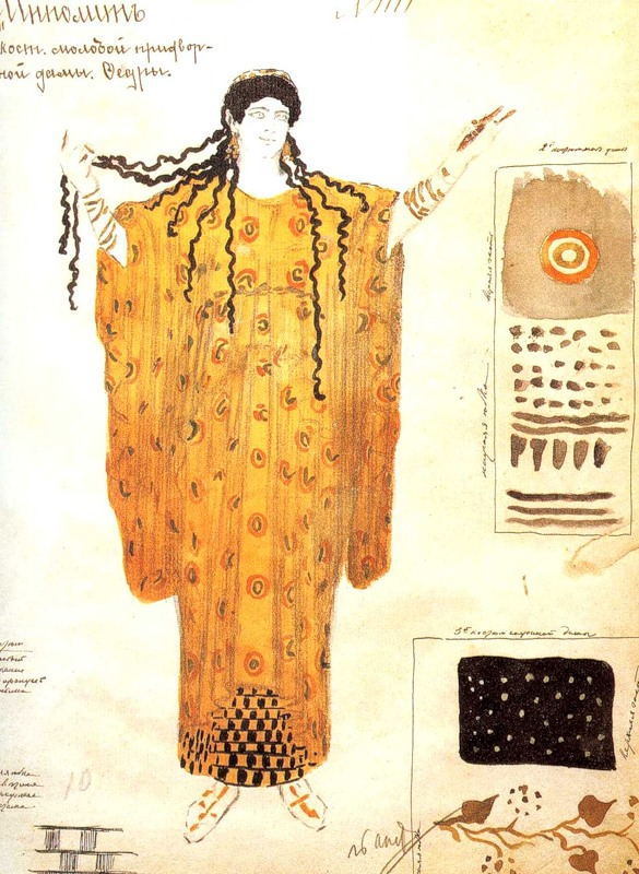 'Hippolytus', by Euripides (1902) Эскиз костюма придворной дамы Федры к балету "Ипполит", 1902